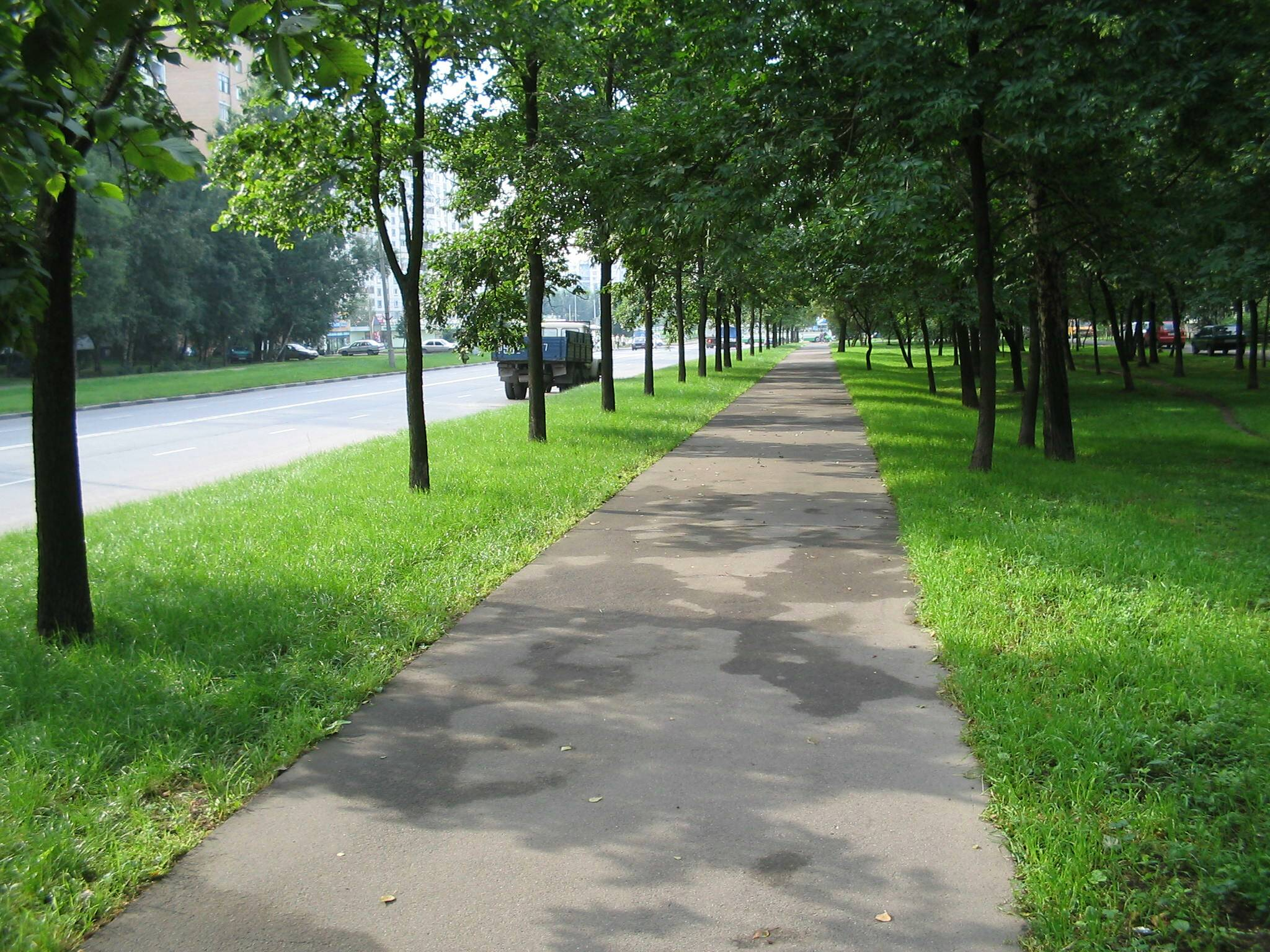 Вид на улицу Дубнинскую (в районе дома 73 корпус 1). Район Восточное Дегунино города Москвы